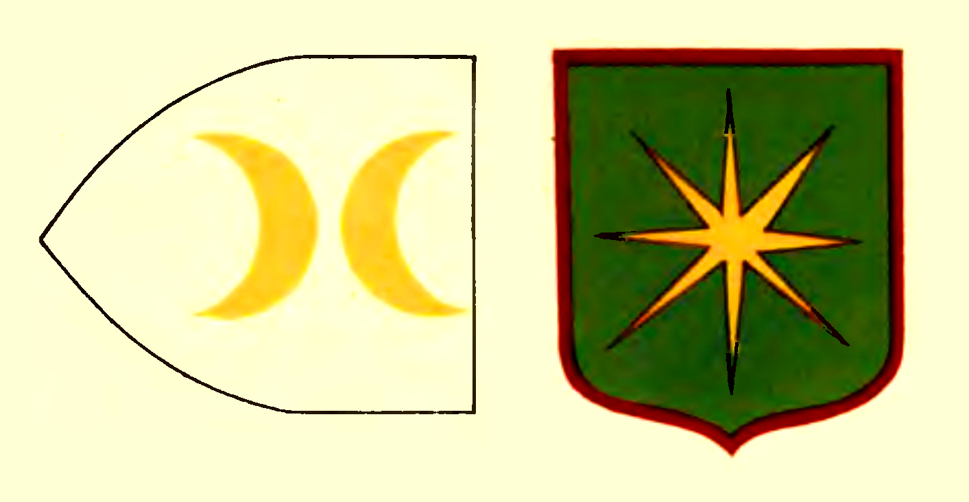 Герб і прапор Ксорману. Герб: в зеленому полі золота восьмипроменева зірка. Прапор: на білому тлі два золоті півмісяці, що нарізно лежать рогами.